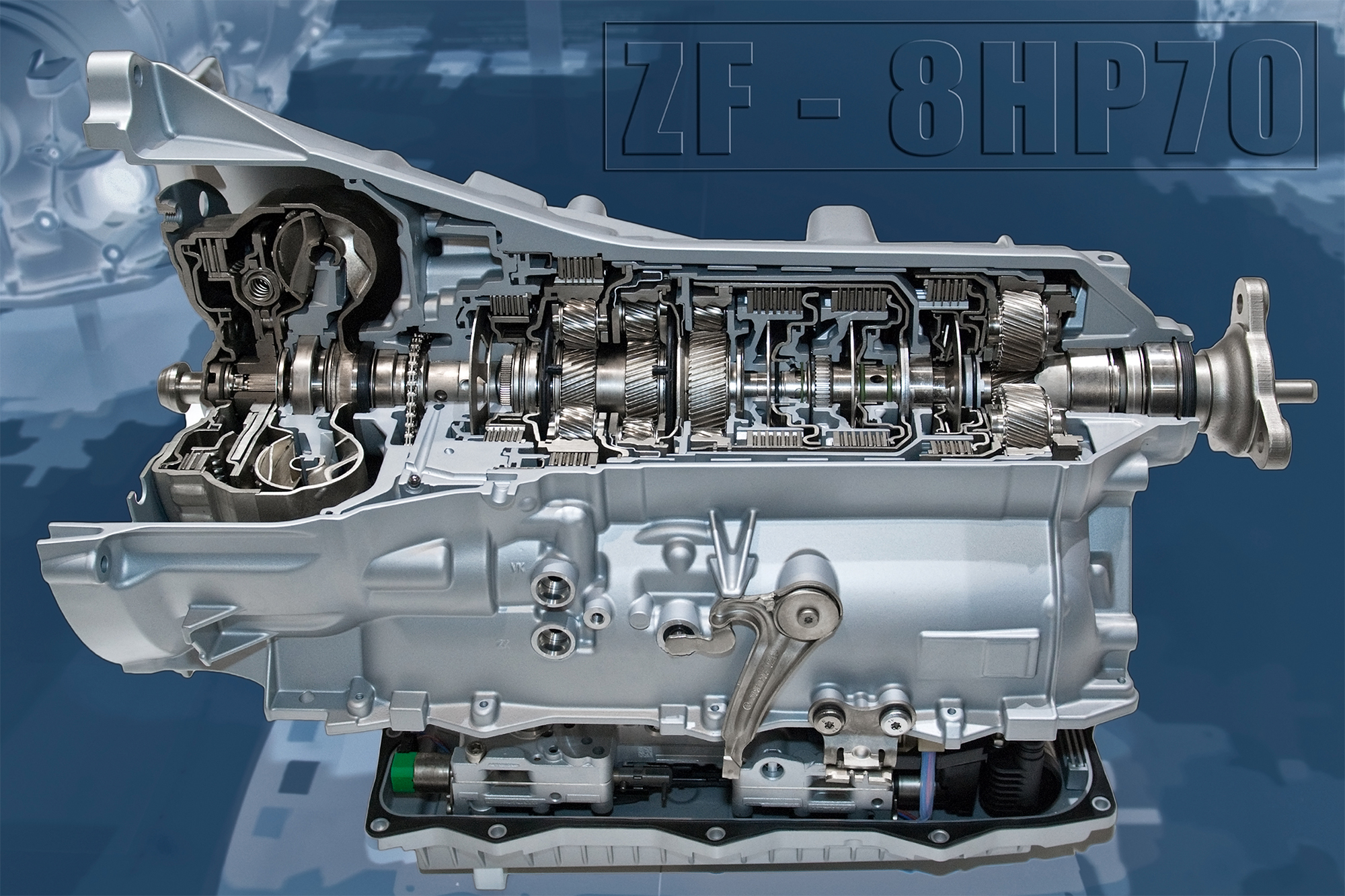 8 Gang Stufenautomatgetriebe der ZF Friedrichshafen AG, Typ:8HP70. Fotografiert am Messestand der ZF-AG bei der Internationalen Automobil Ausstellung 2009.